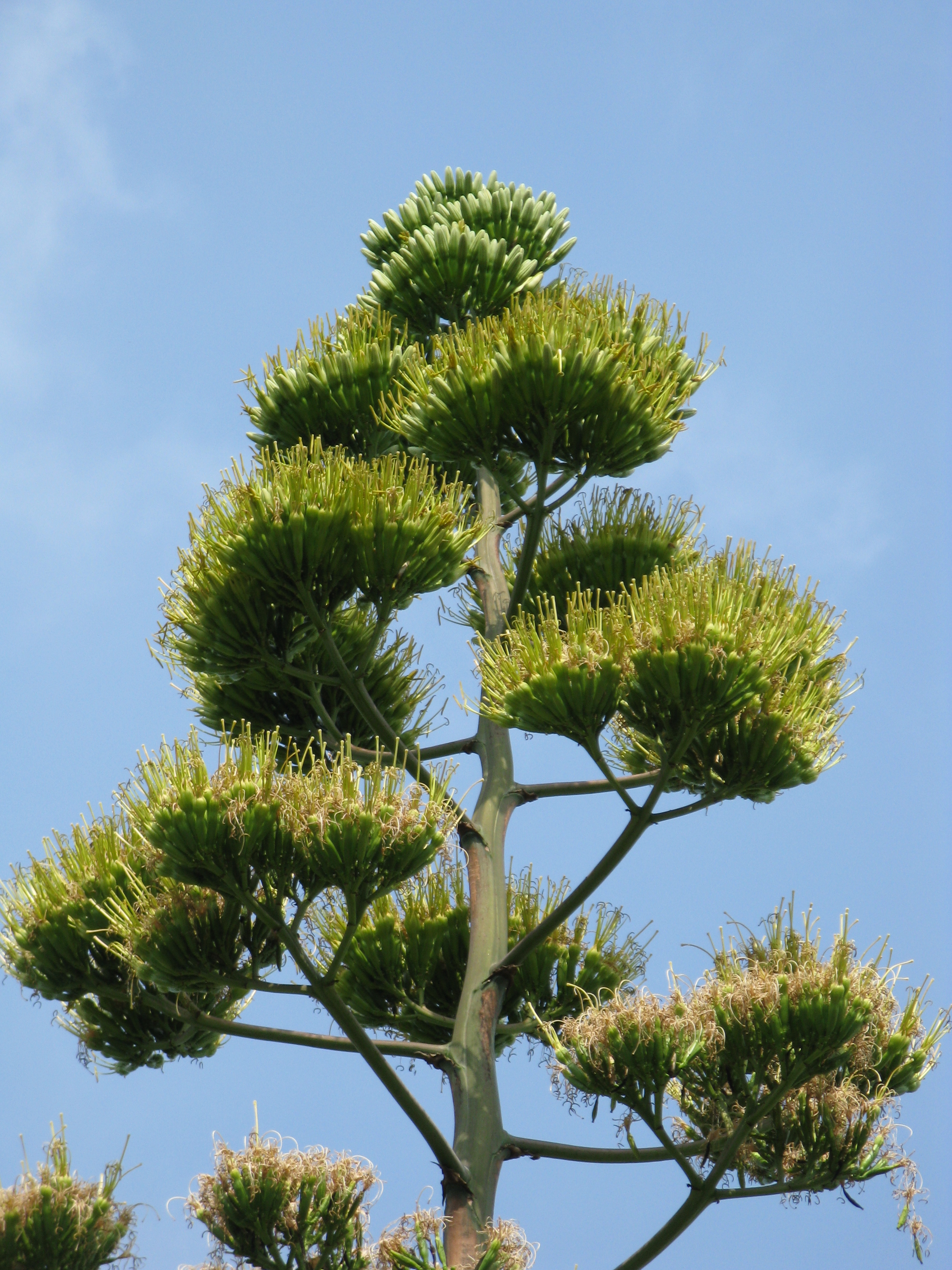 Agave americana